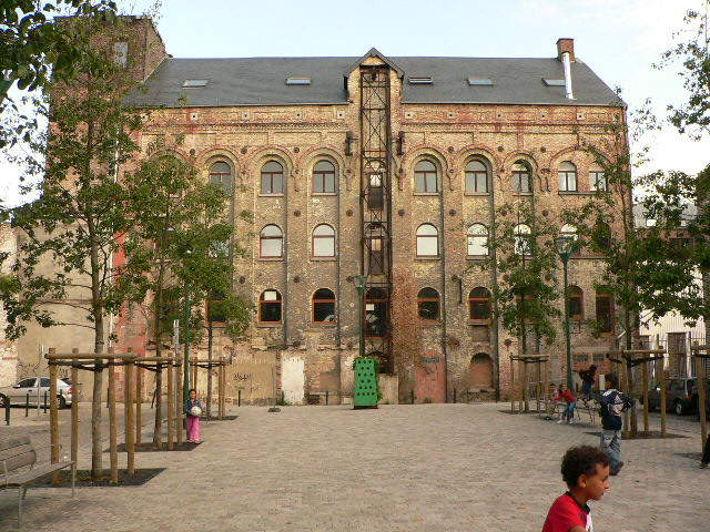 Sint-Jans-Molenbeek, Brussel. Meelfabrieksplein (Fr. place de la Minoterie). Ik Mario Scolas, "eigen werk", geef alle rechten in de Wikimedia foundation en Wikipedia